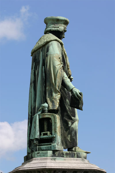 Dirk Martens, eigen foto augustus 2004, hiermee onder GFDL gebracht